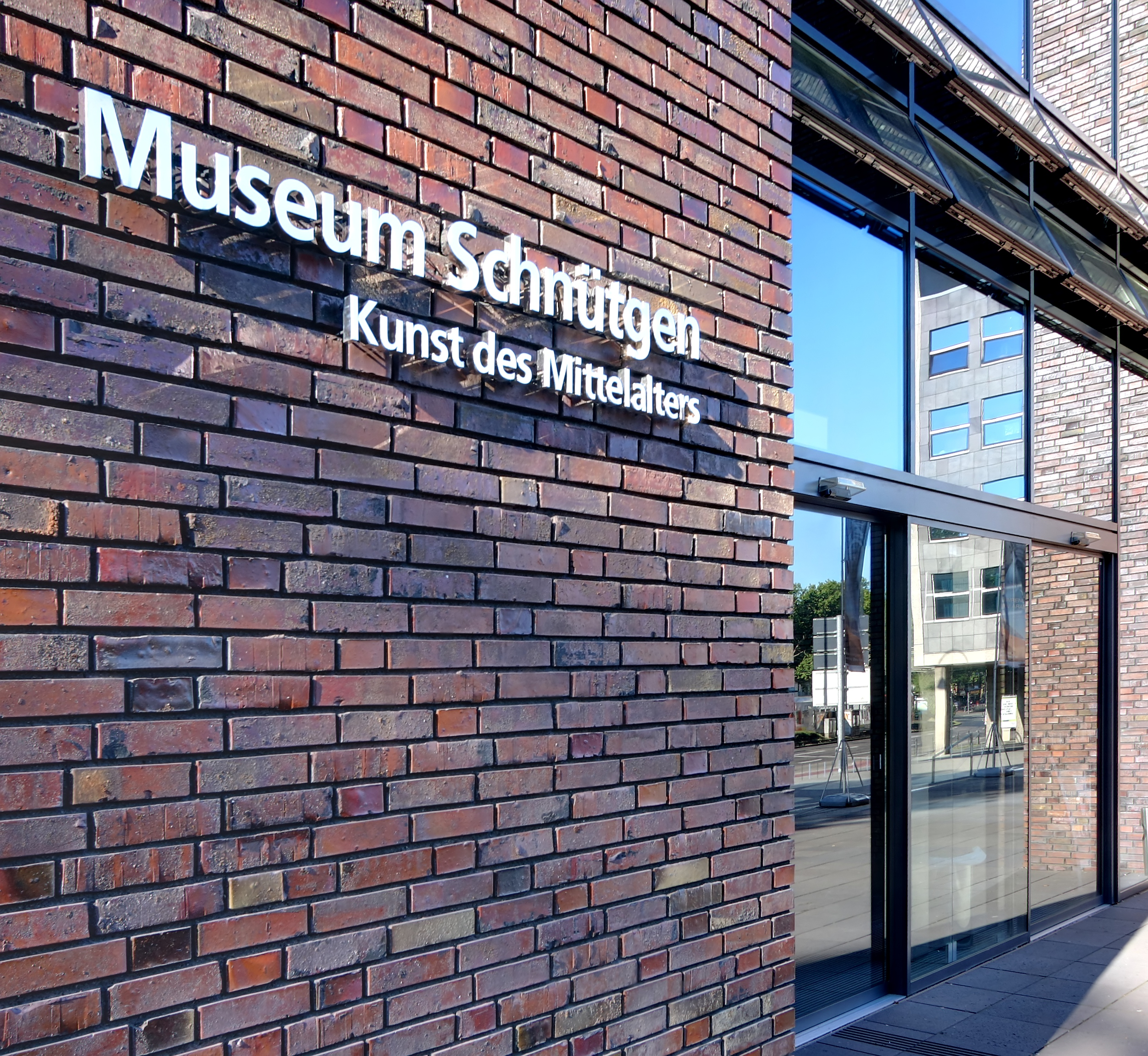 Kulturquartier Köln. Schriftzug links vom Eingang an der Cäcilienstraße: Museum Schnütgen Kunst des Mittelalters